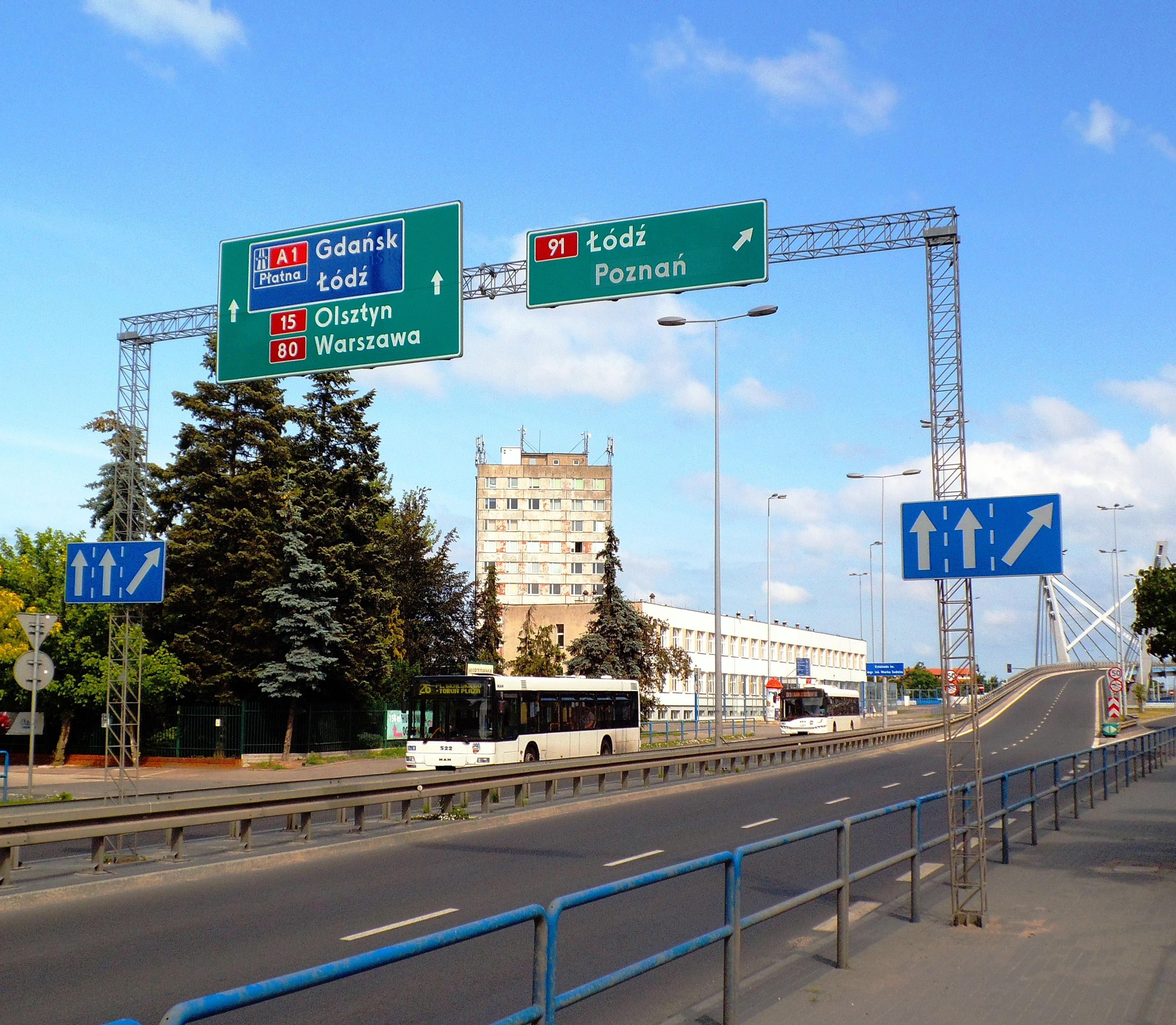 Estakada im. Marka Sudaka w Toruniu